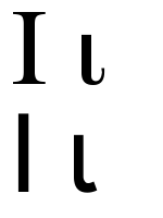 greek letter iota